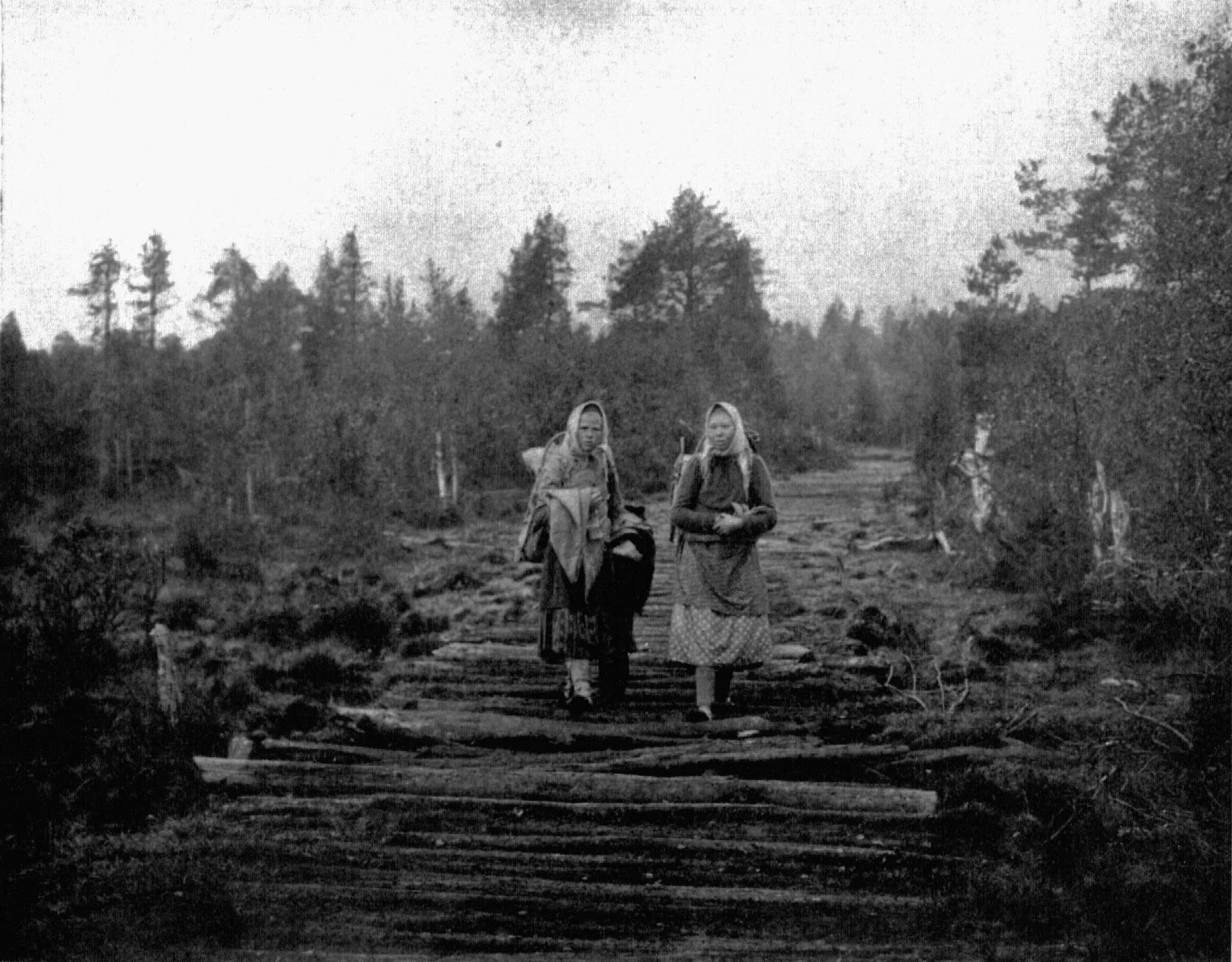 Кемский уезд - Беломорская карелия. Пути сообщения.